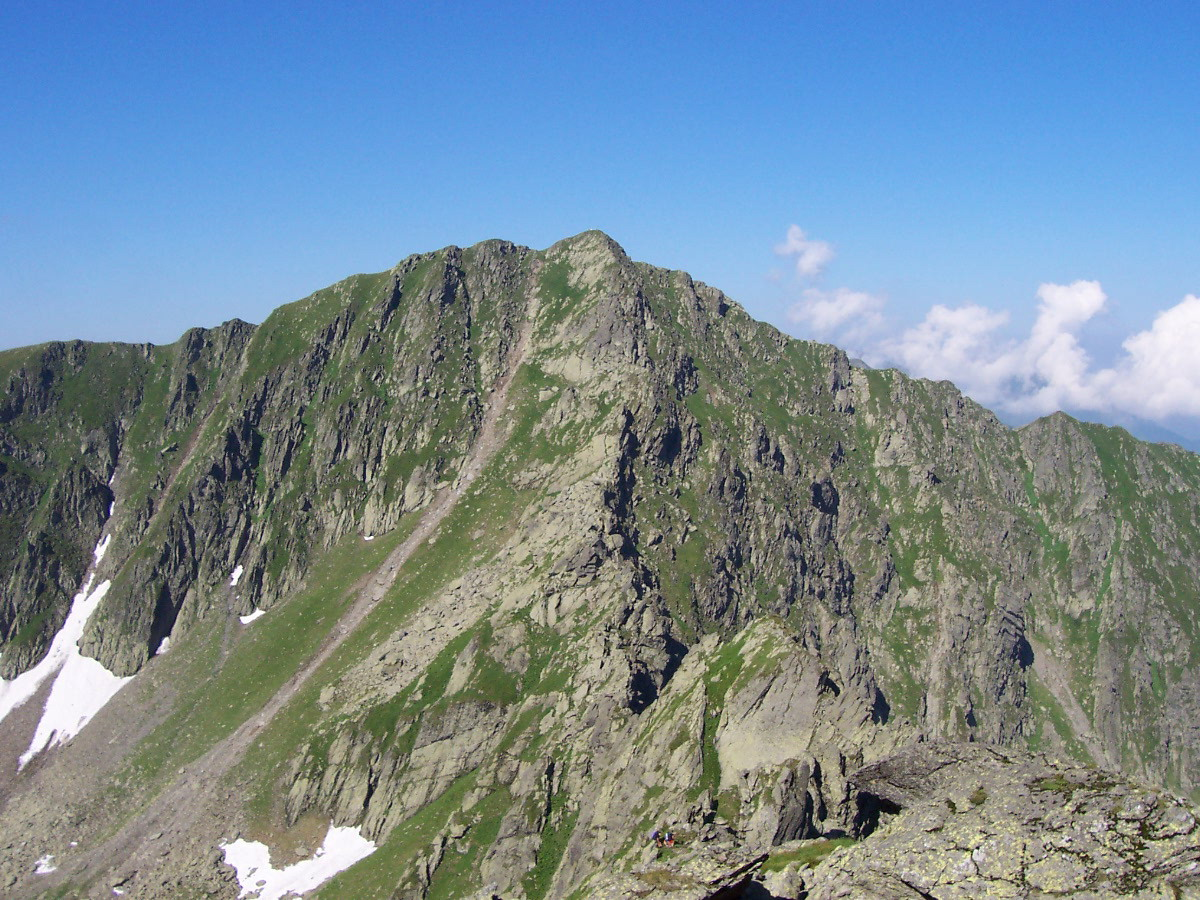 din arhiva personală